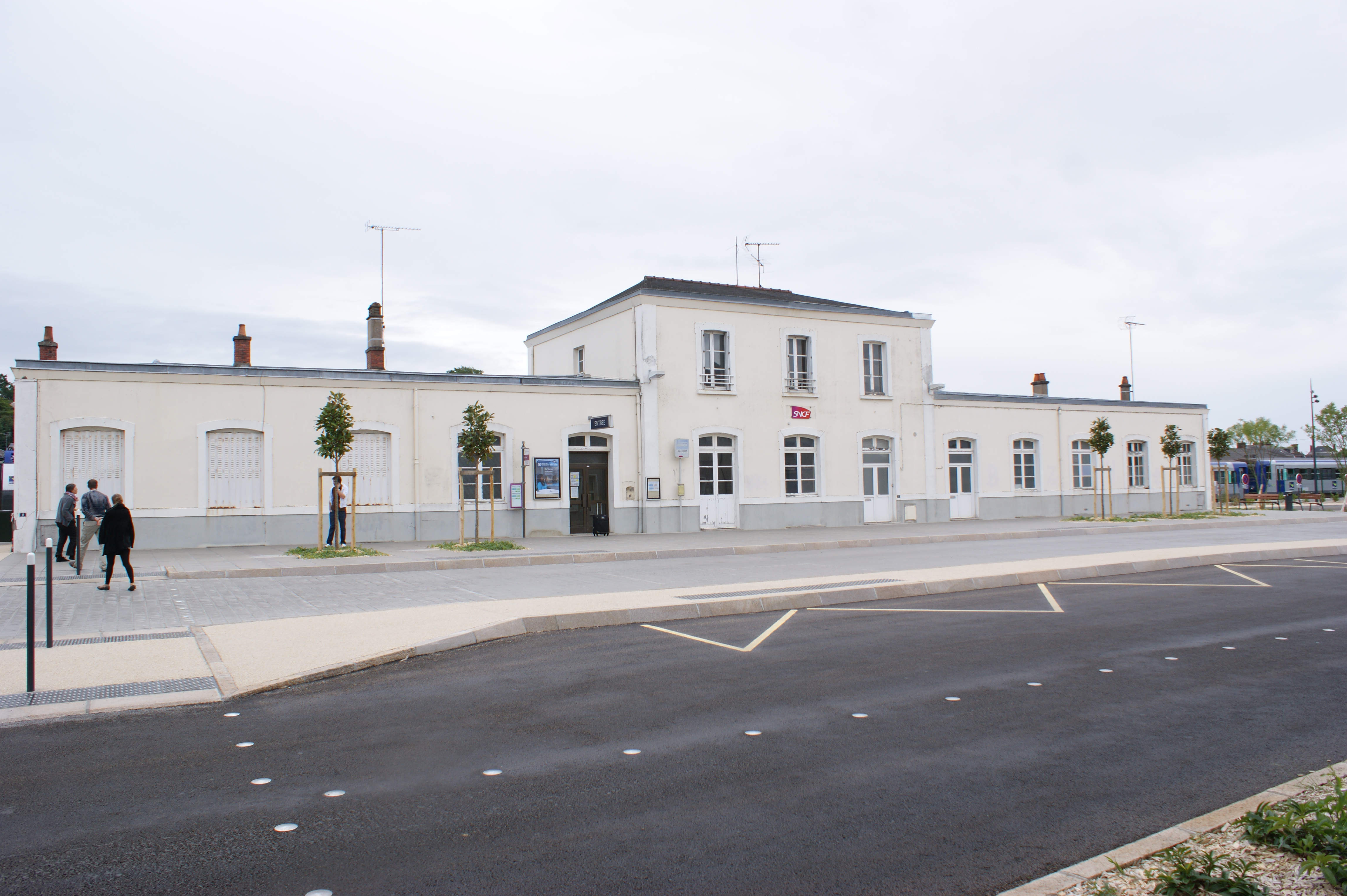 Le bâtiment voyageurs et l'entrée de la gare, vue de la place récemment réhabilitée.